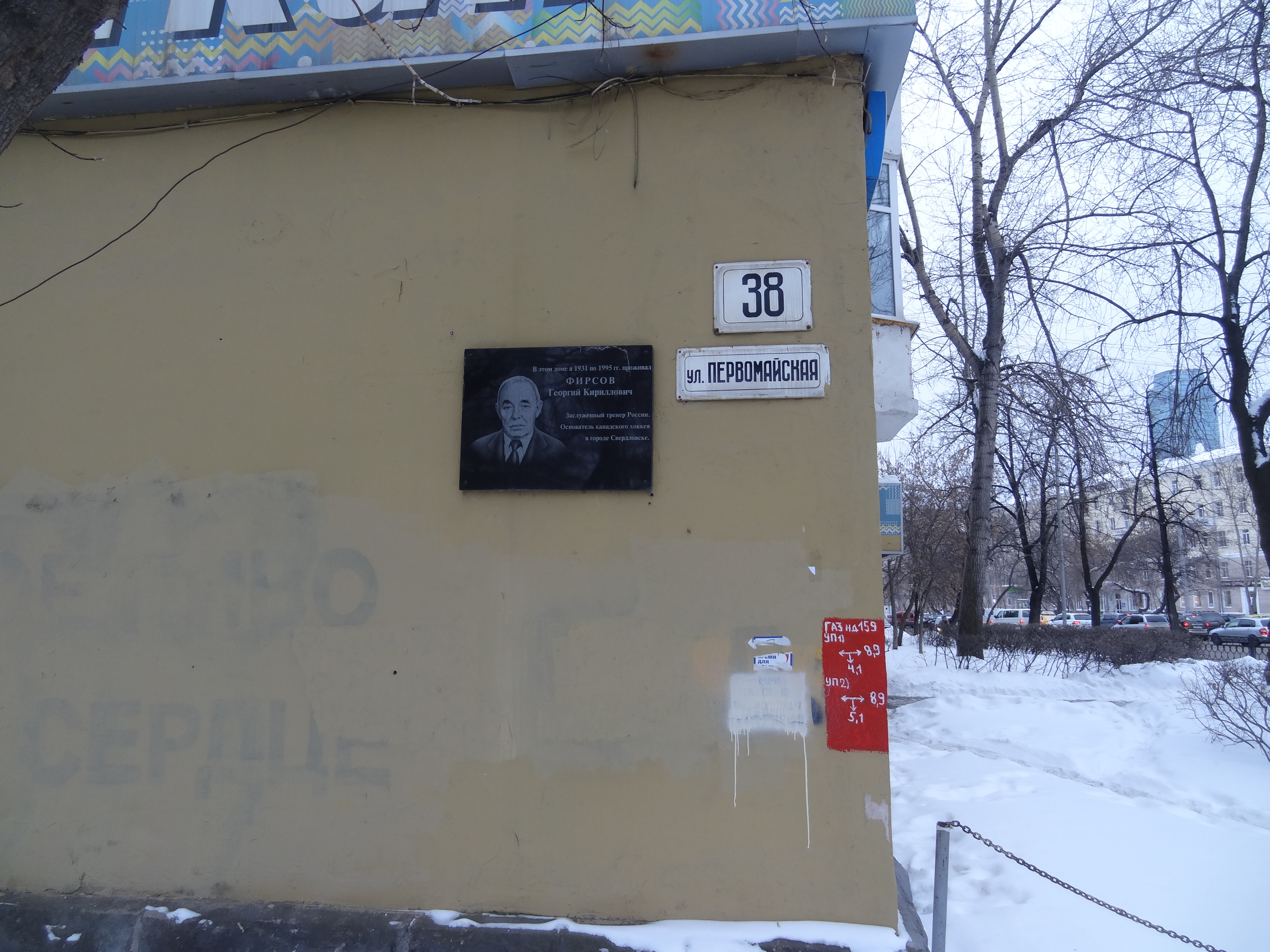 Мемориальная доска Г.К. Фирсову. Надпись на мемориальной доске: "В этом доме с 1931 по 1995 гг. проживал Фирсов Георгий Кириллович. Заслуженный тренер России, основатель канадского хоккея в городе Свердловске".